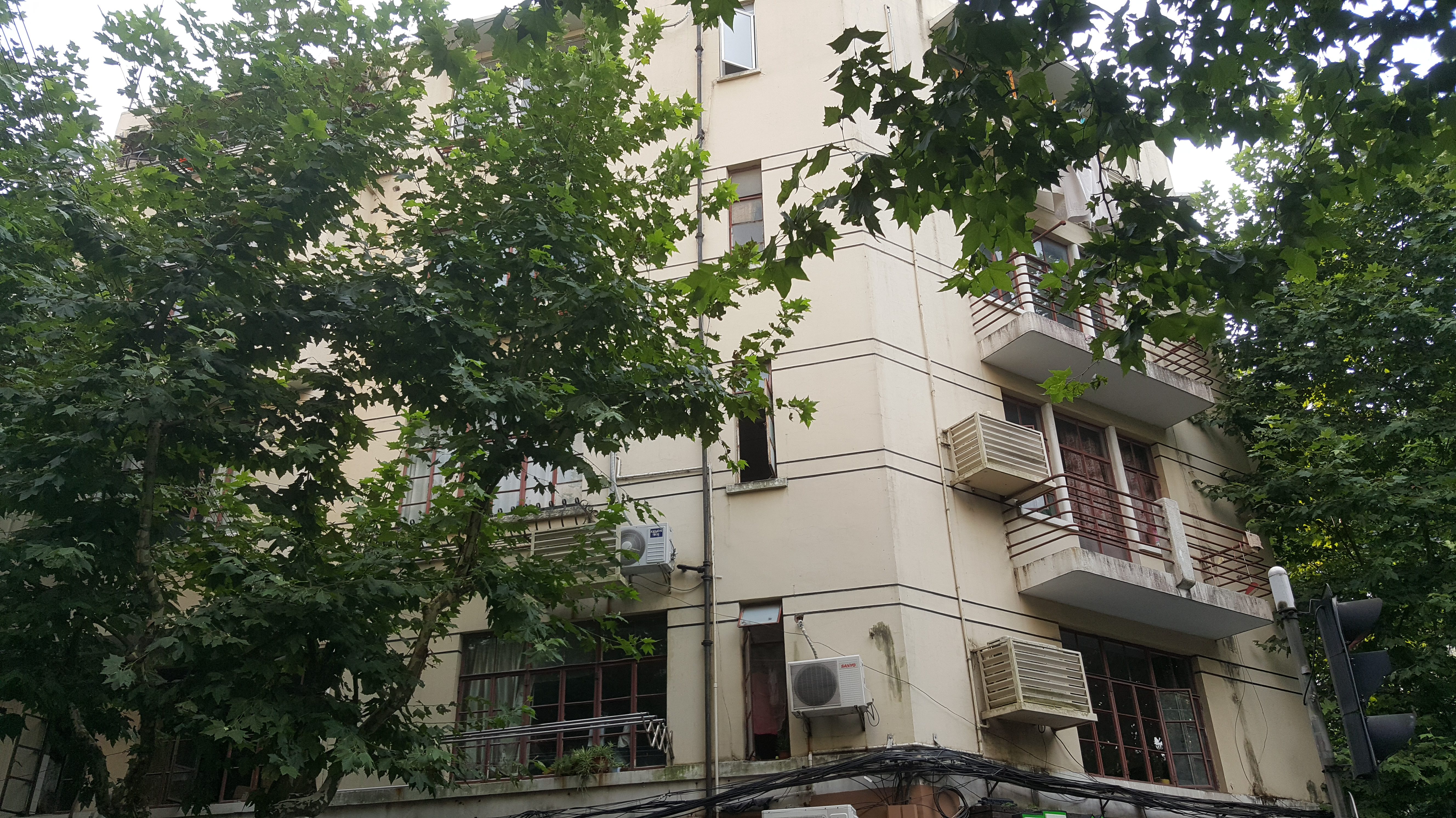 中文（中国大陆）: 国富门公寓是上海市第五批优秀历史建筑